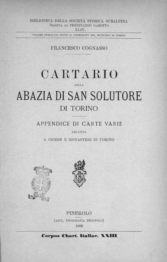 Frontespizio